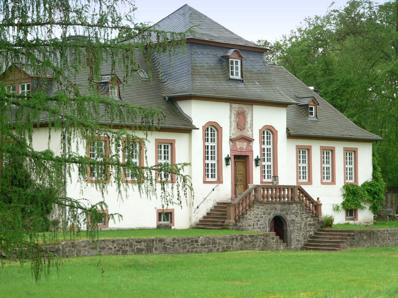 Gästehaus Kloster Arnsburg bei Lich, Hessen, Germany